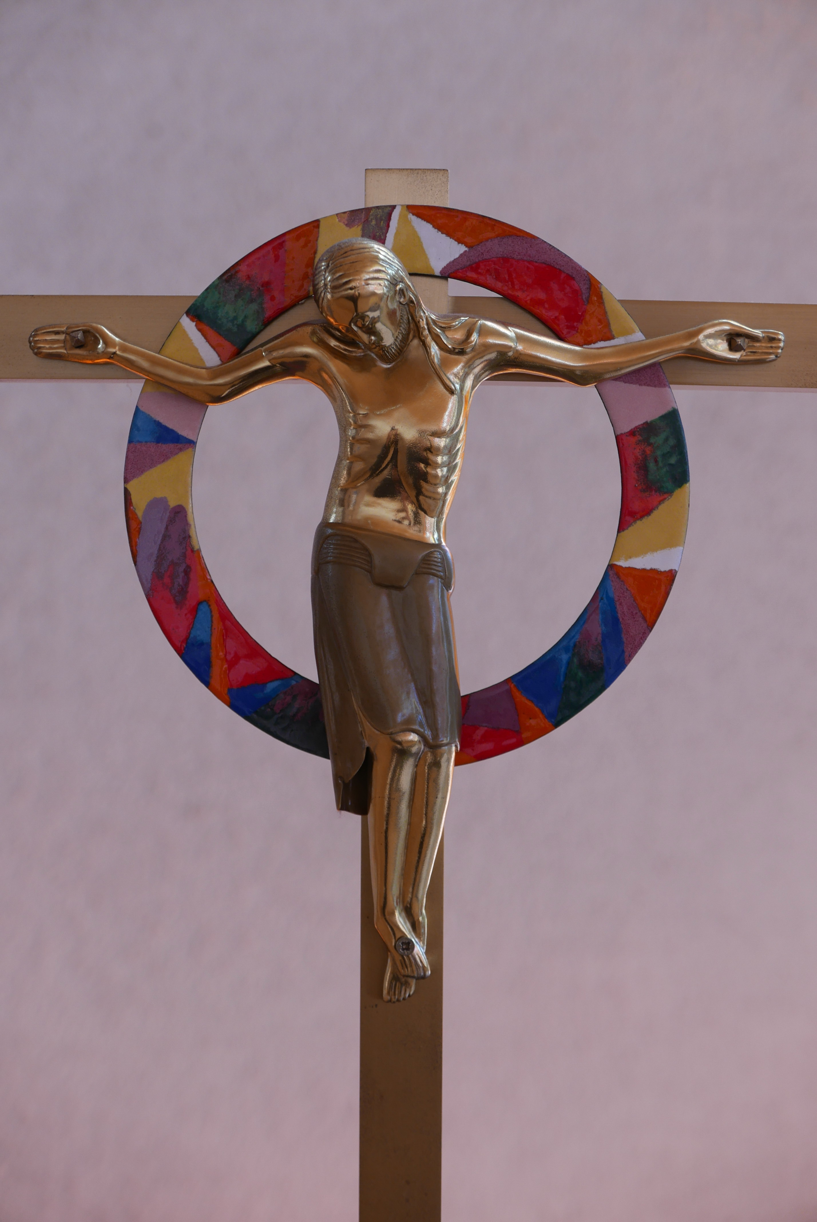 Figuraler gekreuzigter Jesus, Vortragekreuz; Das Vortragekreuz "Figuraler gekreuzigter Jesus" auf einem Kreuz aus Metallformrohren mit einem farbigen Kreisring aus Email schuf der Laienbruder und Kunstschmied Bernward Schmid OSB. Es befindet sich in der Filialkirche Aigen im Ennstal.